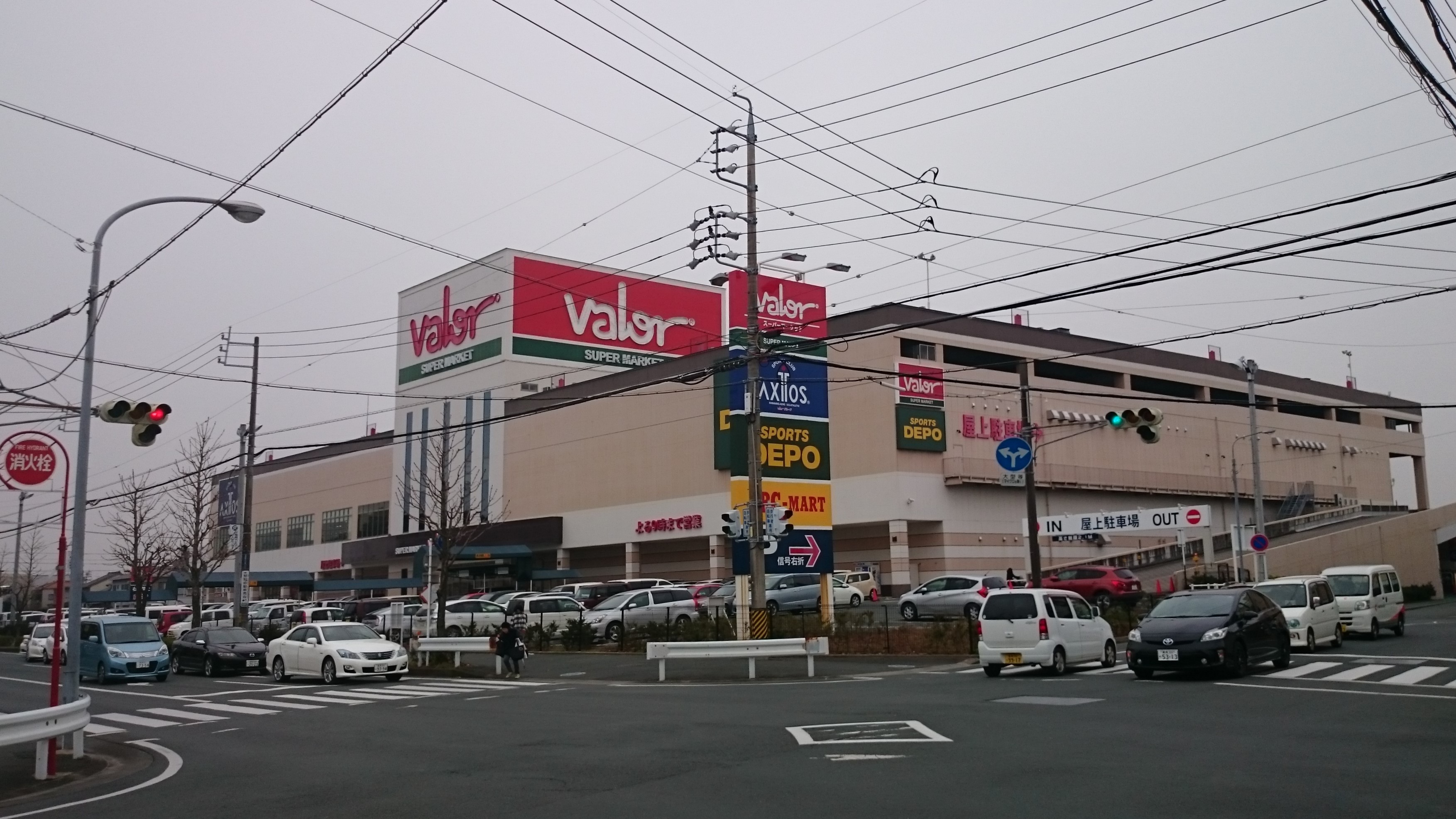 正面より撮影（2016年2月）